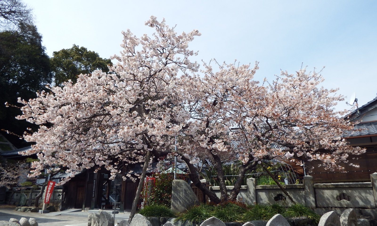 新居浜市の明正寺門前に咲く